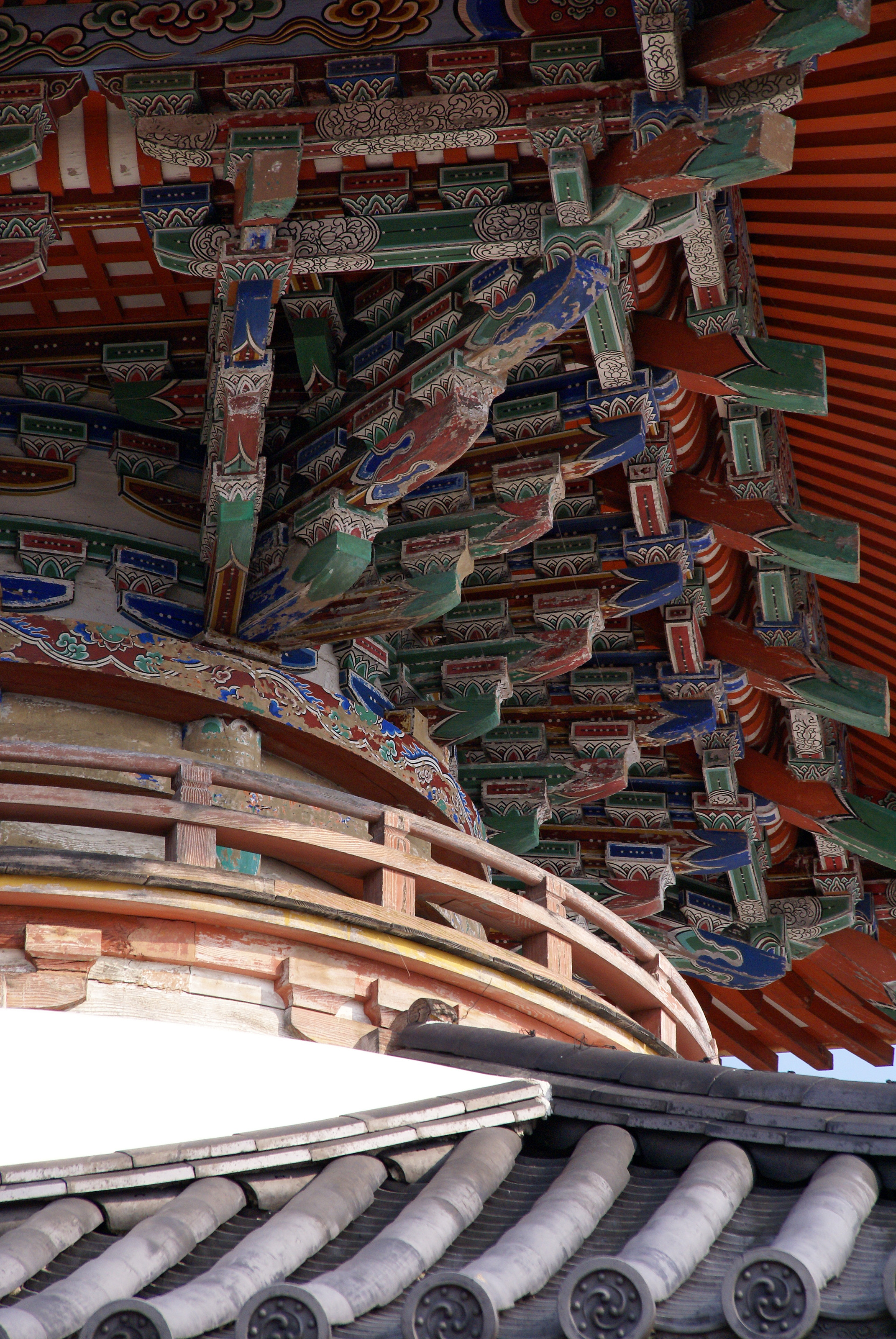 Sagamiji in Kasai, Hyogo, Japan